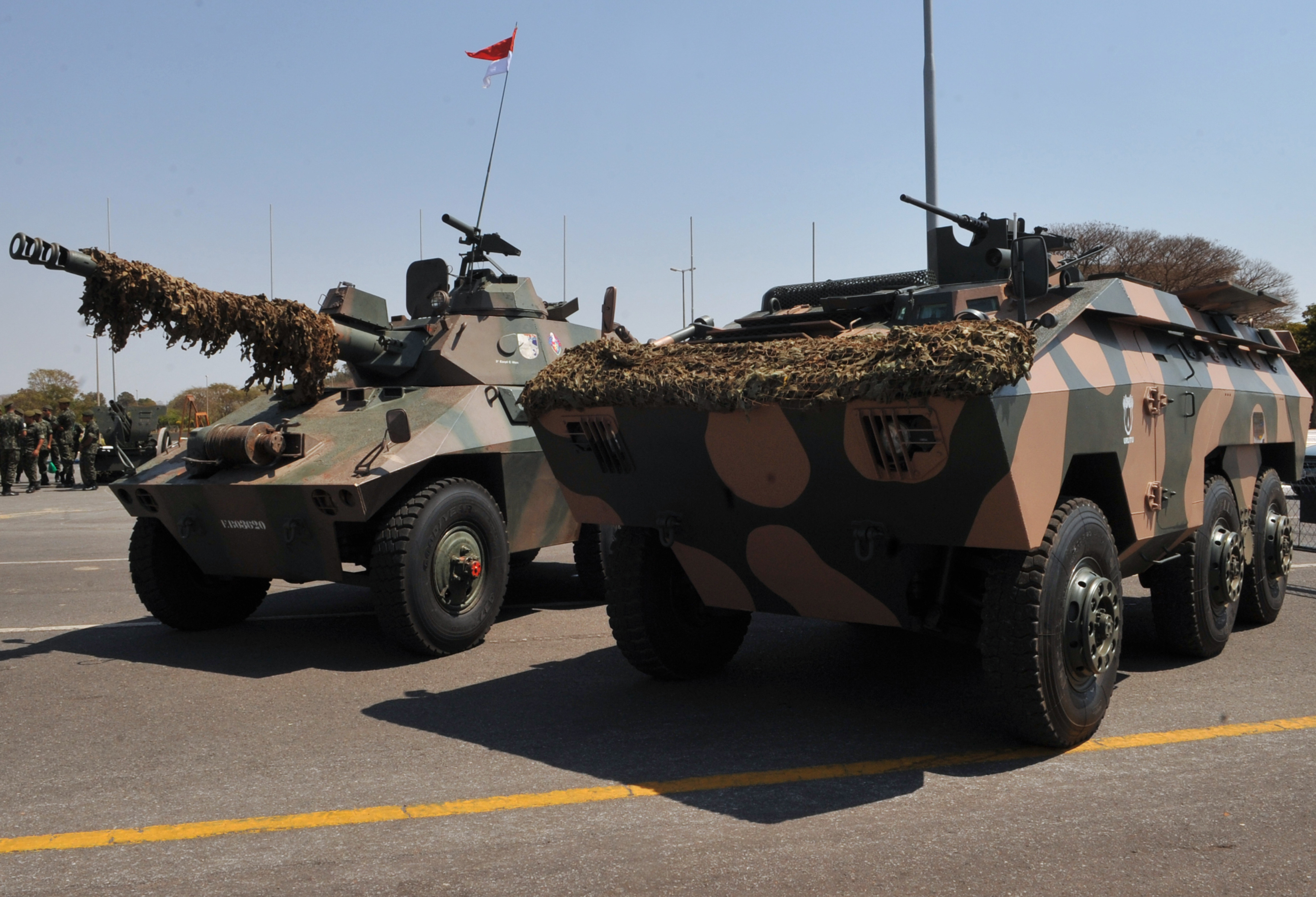 Brasília - O Exército Brasileiro faz exposição de material militar, em comemoração ao Dia do Soldado, comemorado no dia 25 de agosto.